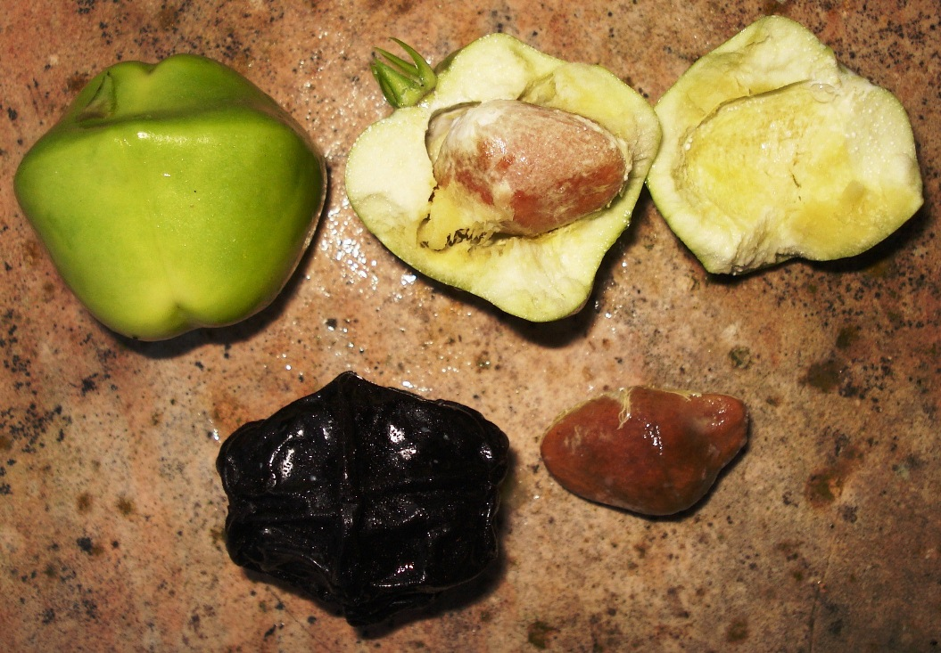 Thevetia_peruviana_-_Fruits